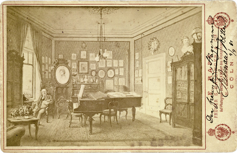 Ferdinand Hiller, Komponist, Gewandhauskapellmeister in Leipzig, städt. Musikdirektor und Konservatoriumsdirektor in Köln (1811-1885). Photographie seines Musikzimmers mit eigh. Widmung 16,5 x 10,7 cm. (Köln) 4. September 1881